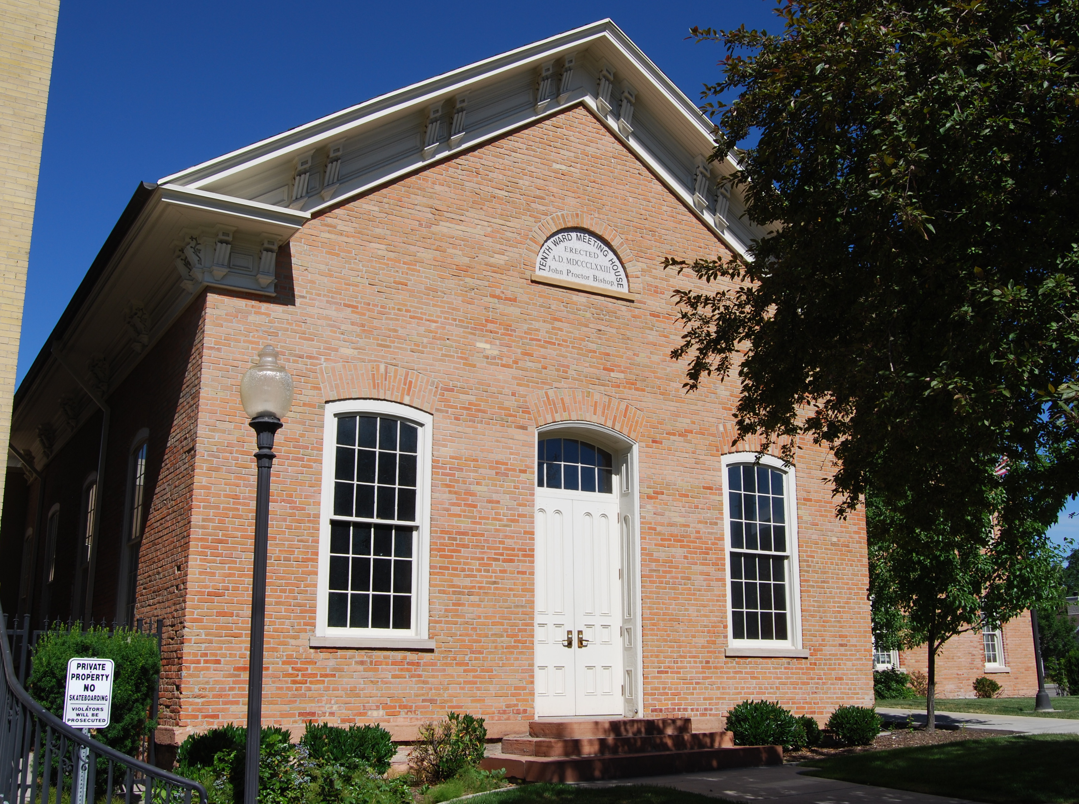 LDS meeting house (built 1873) in Salt Lake City, UT